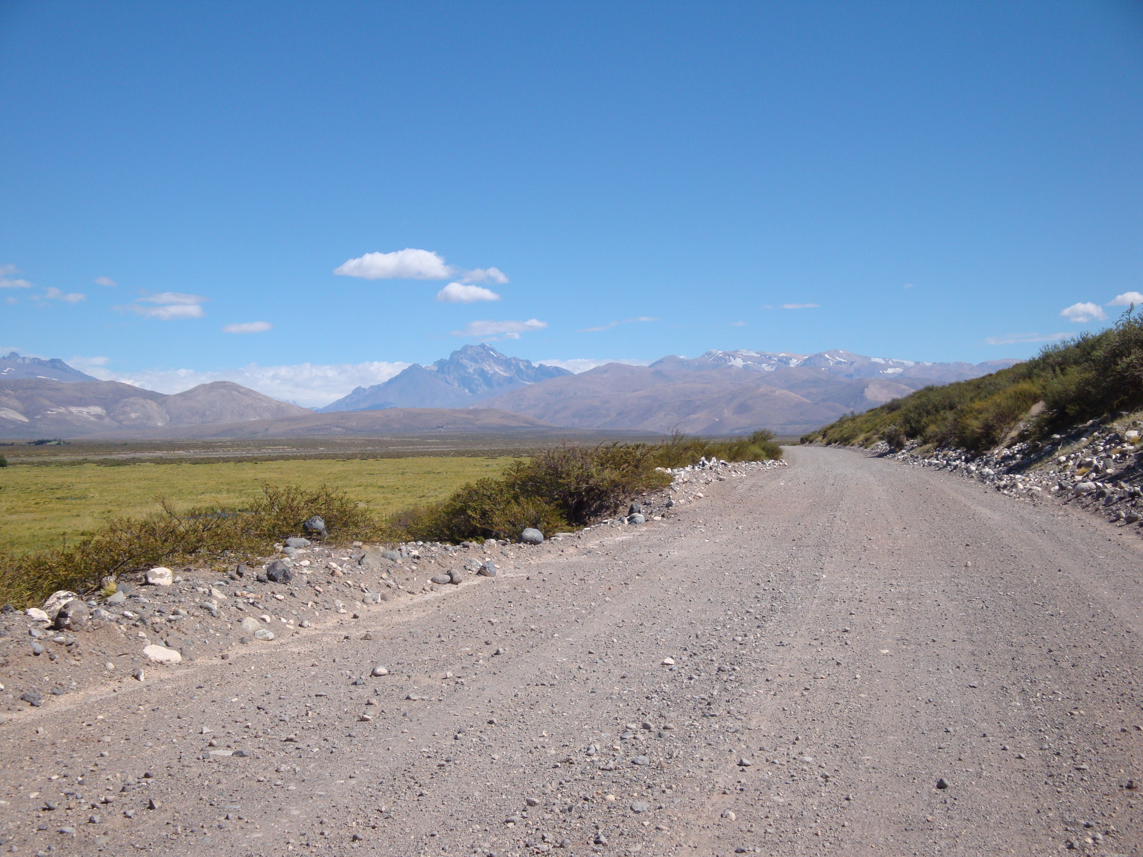 Ruta Provincial 220 en el distrito El Sosneado del Departamento San Rafael, Provincia de Mendoza, Argentina.